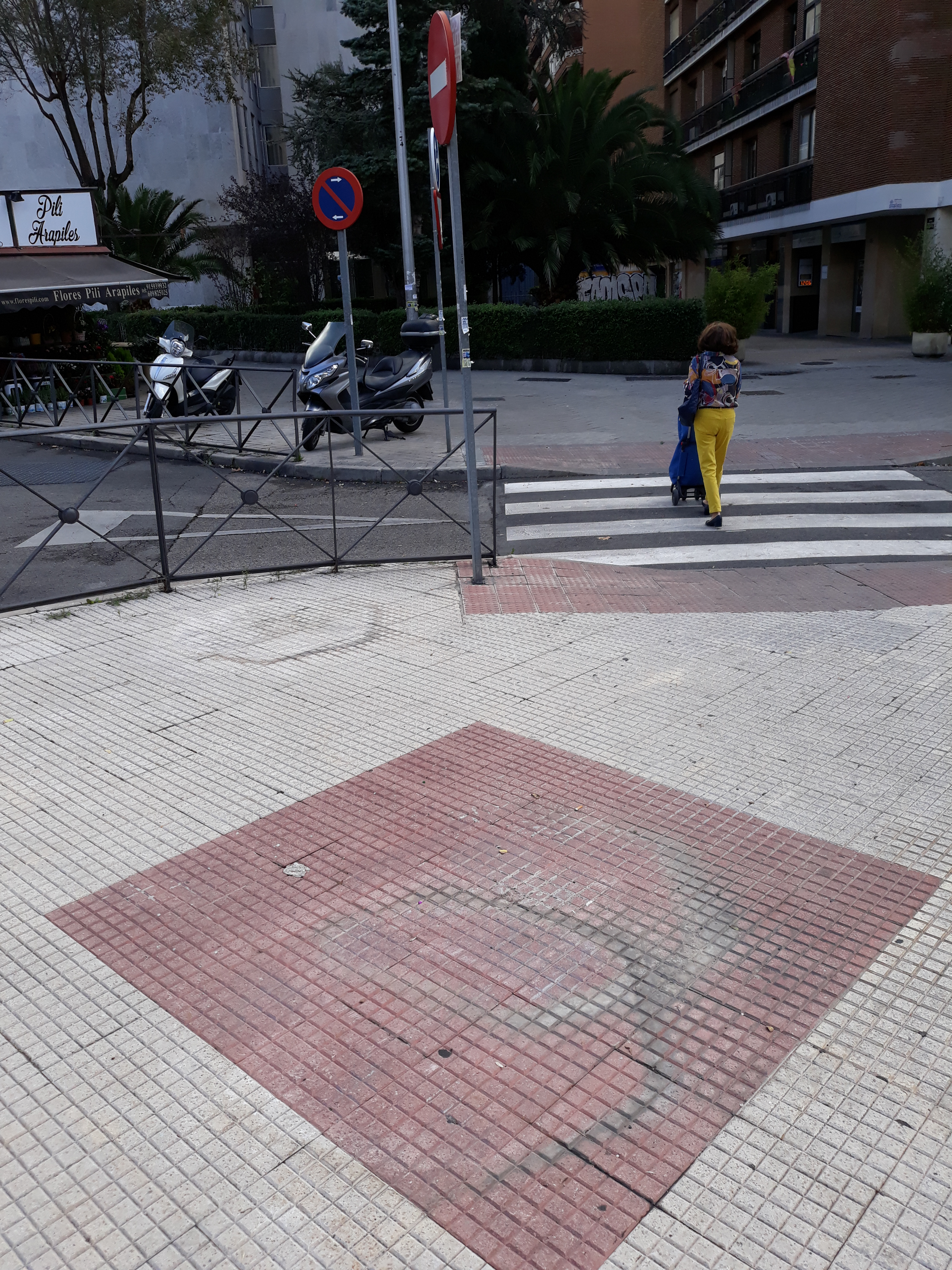 Madrid, Plaza del Conde del Valle de Súchil (2019): der vorgesehene Standort der Telefonzelle, die als Denkmal an die Dreharbeiten zu dem Kurzfilm La cabina (1972) von Antonio Mercero (1936–2018) auf der nahe gelegenen (nicht öffentlich zugänglichen) Plaza de Arapiles erinnern soll